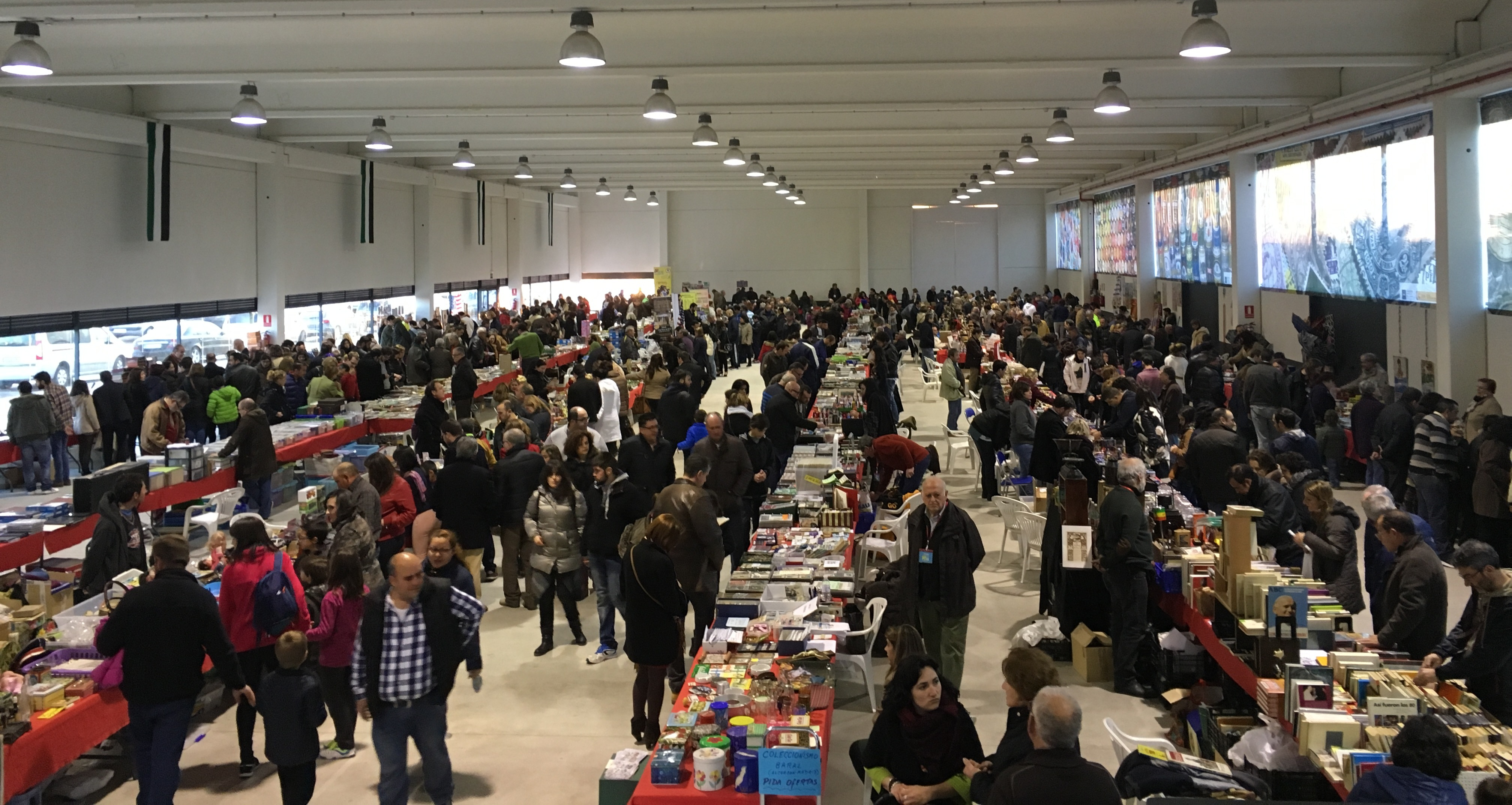 Imagen de la feria en la edición del 2016